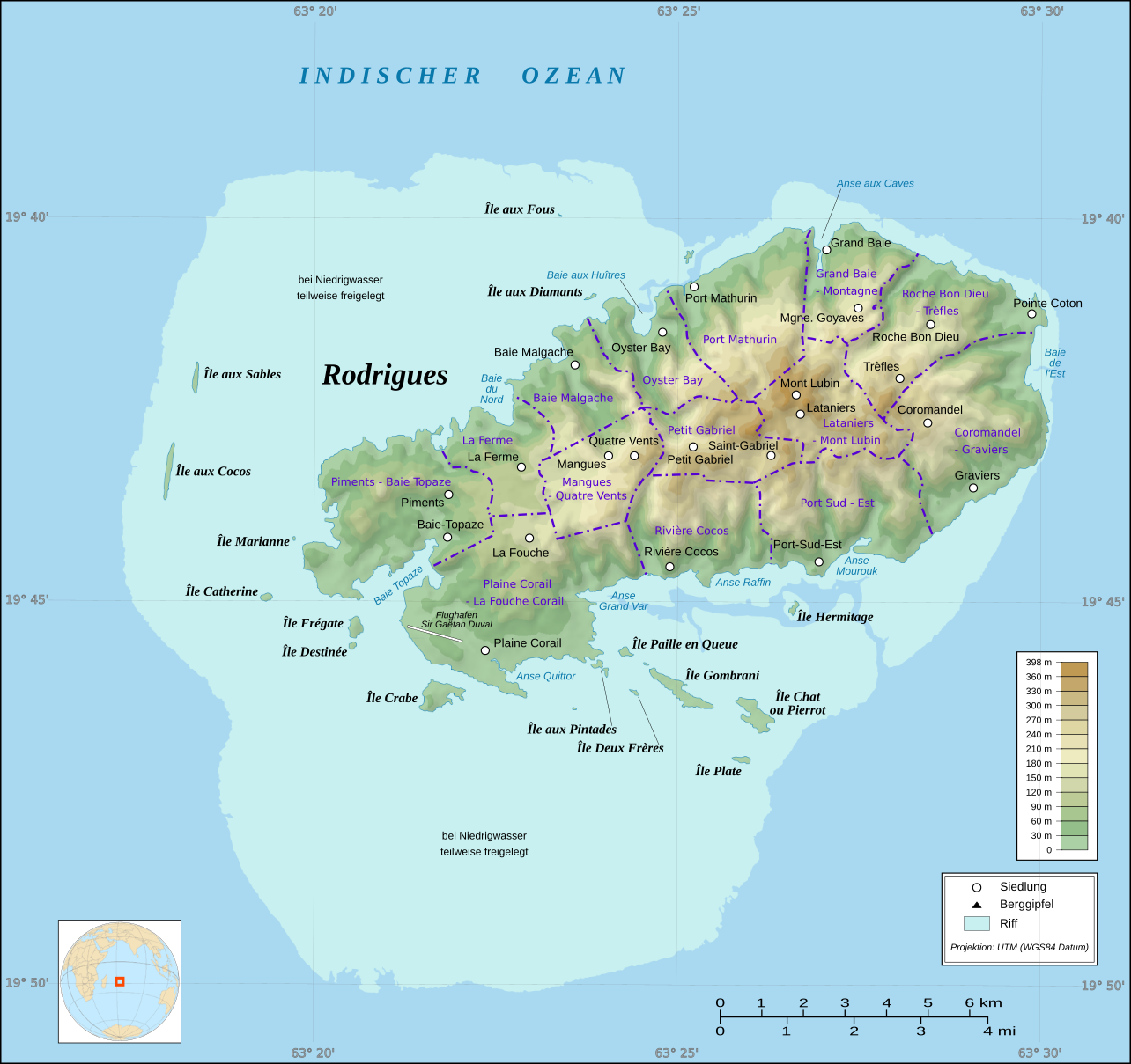 Zonenkarte der Insel Rodrigues